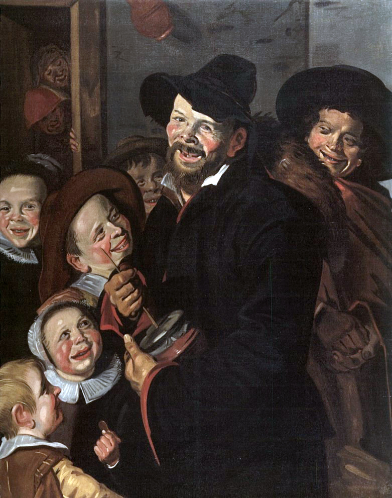 Der Rommelpotspieler mit 6 Kindern Hals München Privat Privatbesitz, selbst fotografiert 1996, Entstehung 1618-22, Lizens selbst, Variante in "Der Rommelpot"